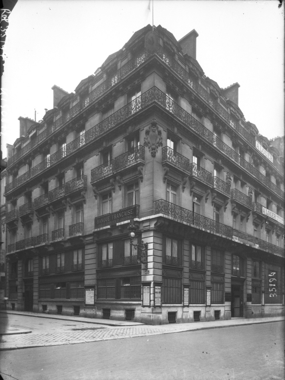 Banque française pour le commerce et l'industrie : bâtiments square de l'Opéra